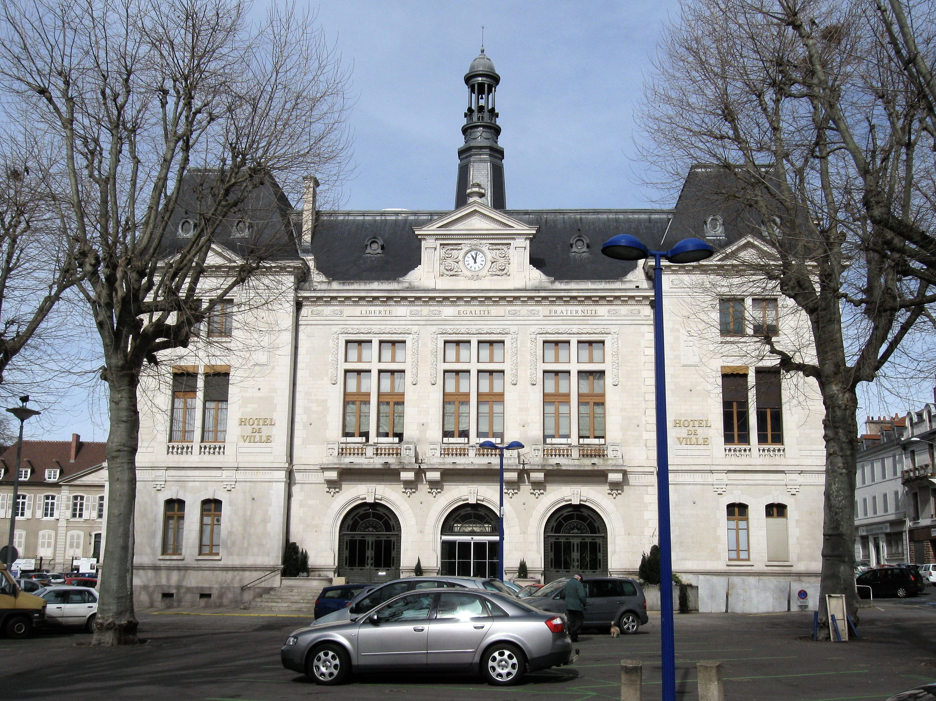 L'Hôtel-de-Ville, Montluçon, Allier, France